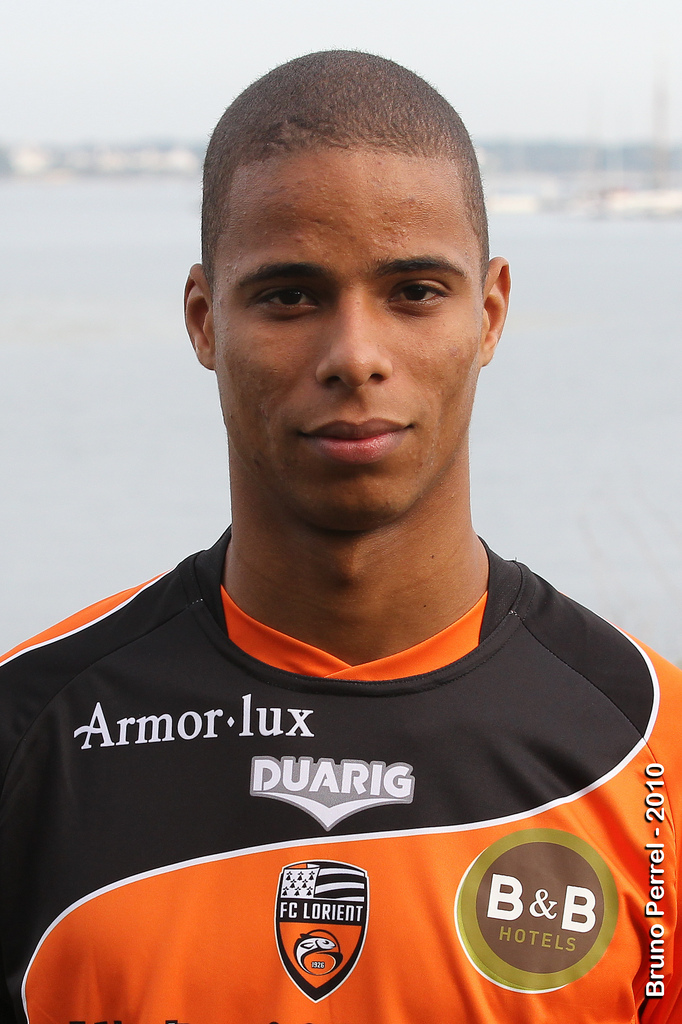 Kévin Monnet-Paquet, joueur de l'équipe de football du FC Lorient en 2010.